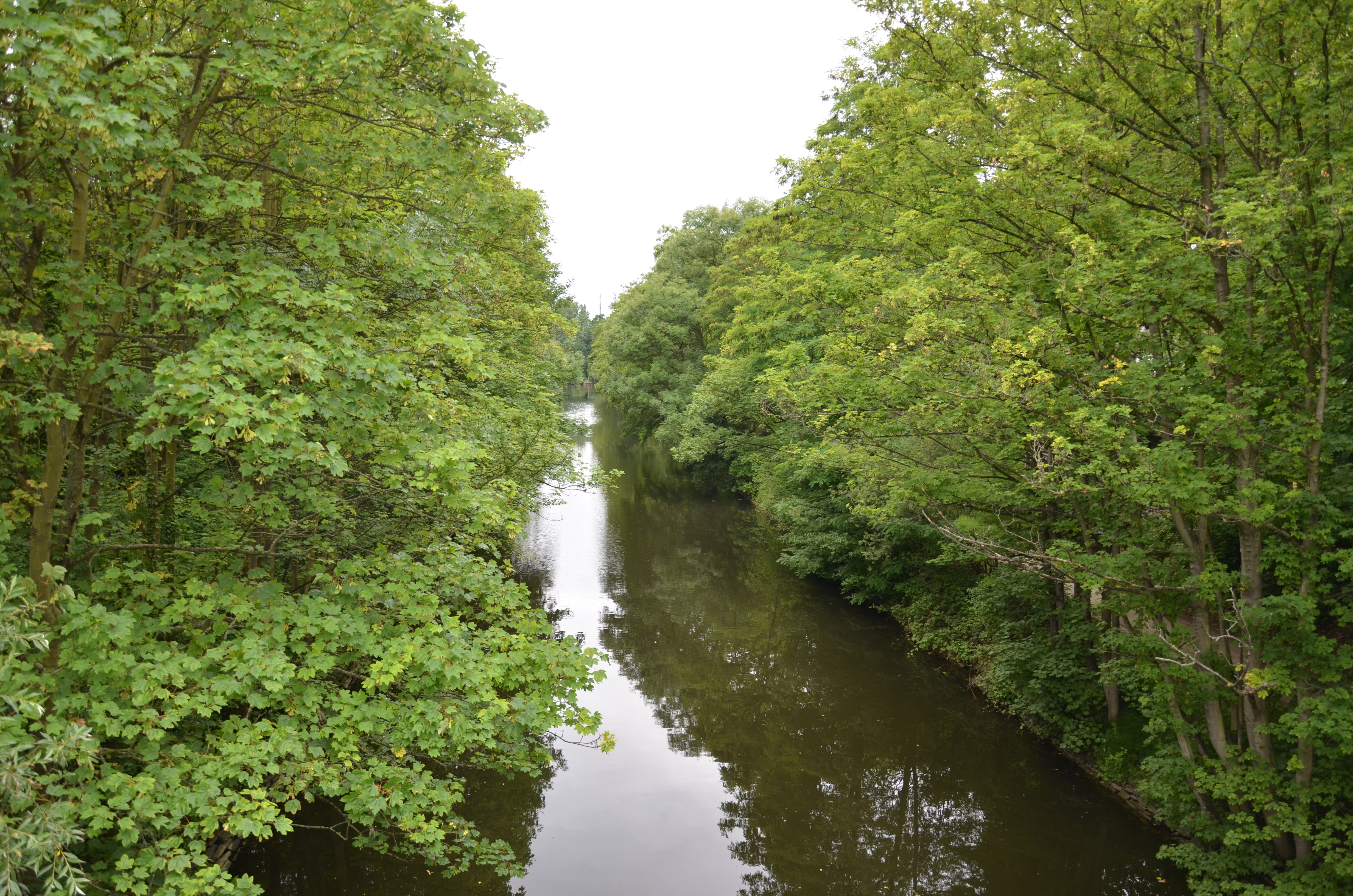 Canal de Roubaix, près de la zone de l'Union, à Roubaix. Les berges du canal tiennent lieu de trame verte et ripisylve dans cette partie de la communauté urbaine.